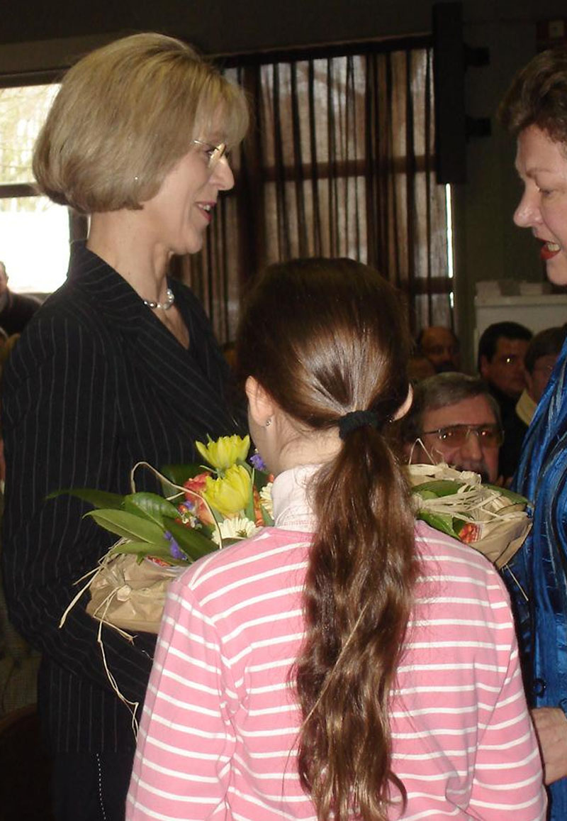 Bärbel Dieckmann im :Carl-von-Ossietzky-Gymnasium (Bonn)